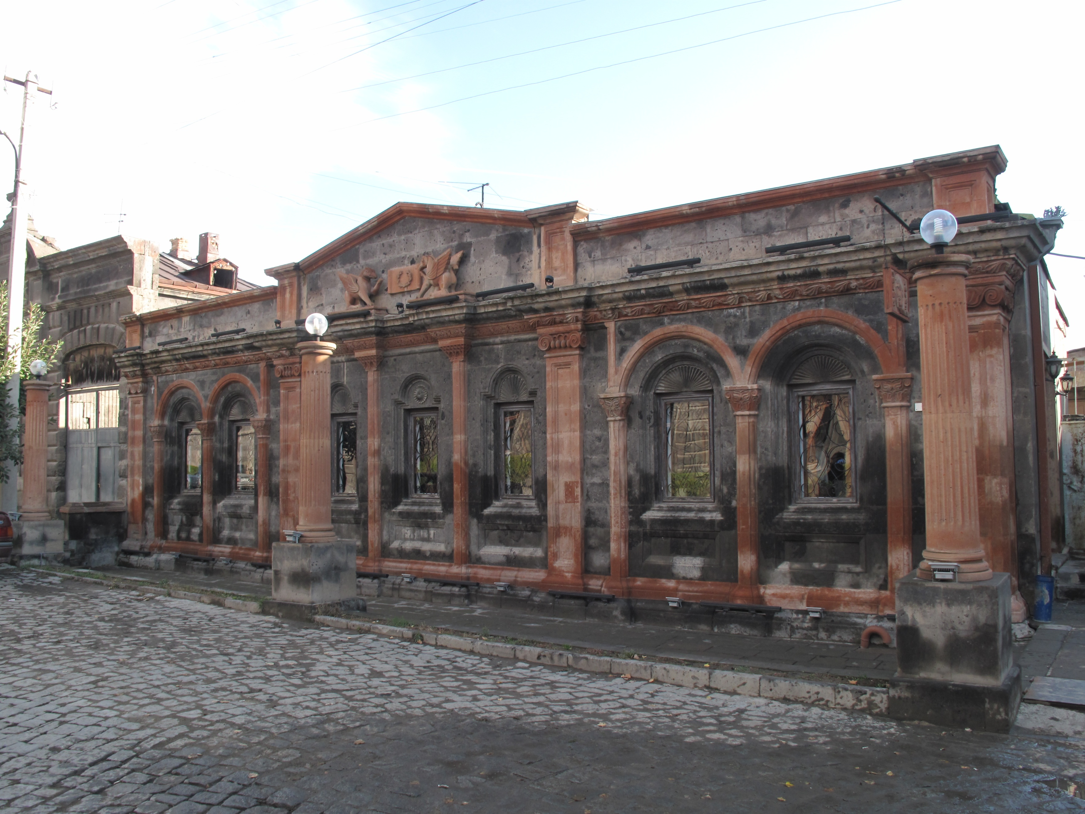 Poloz Mukuch beerhouse in Gyumri, Shirak, Armenia. 1/4.909